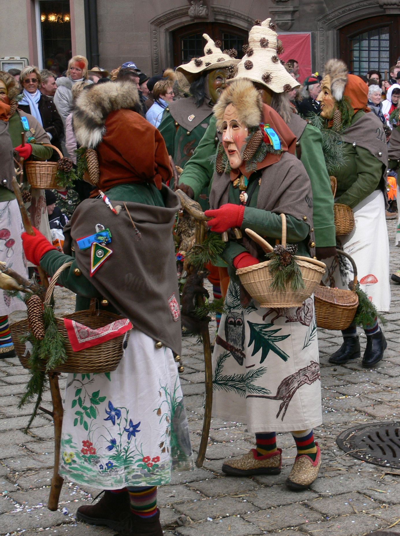 Plätzlerzunft Weingarten, Figur: Waldweible Veranstaltung: Narrensprung beim Narrentreffen Meßkirch 2006